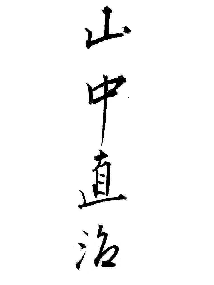 作曲家山中直治のサイン